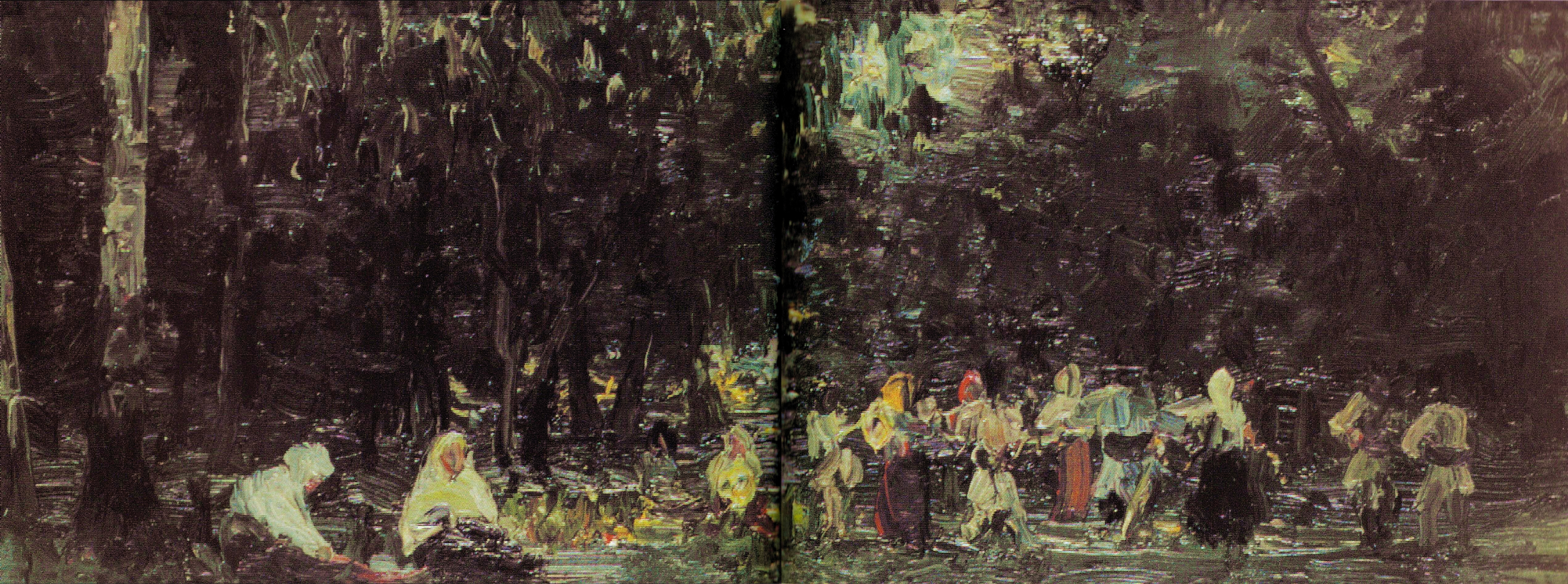 Zi de sărbătoare